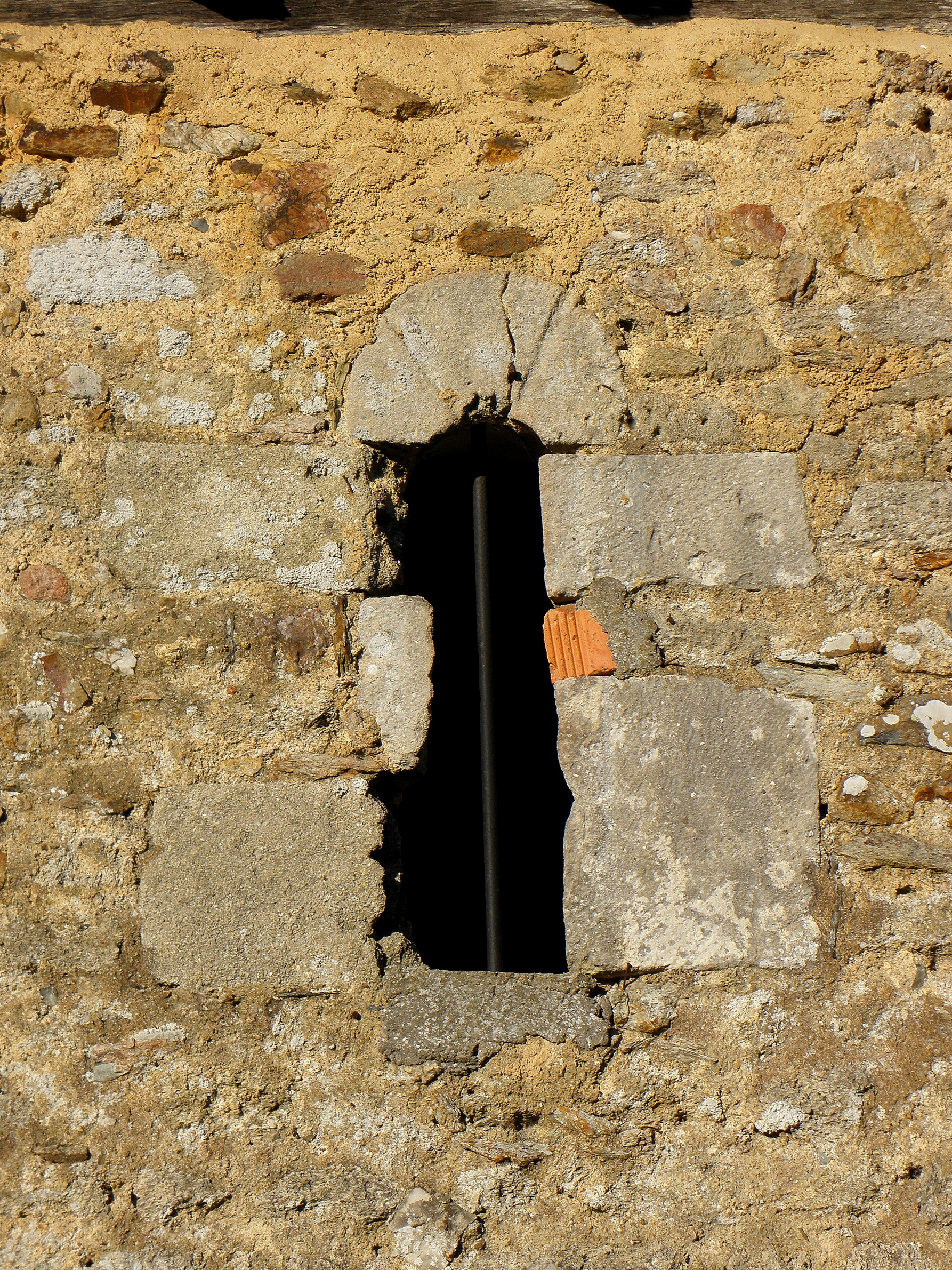 Chapelle Saint-Pierre d'Argentré-du-Plessis (35). Fenêtre romane méridionale du chœur.